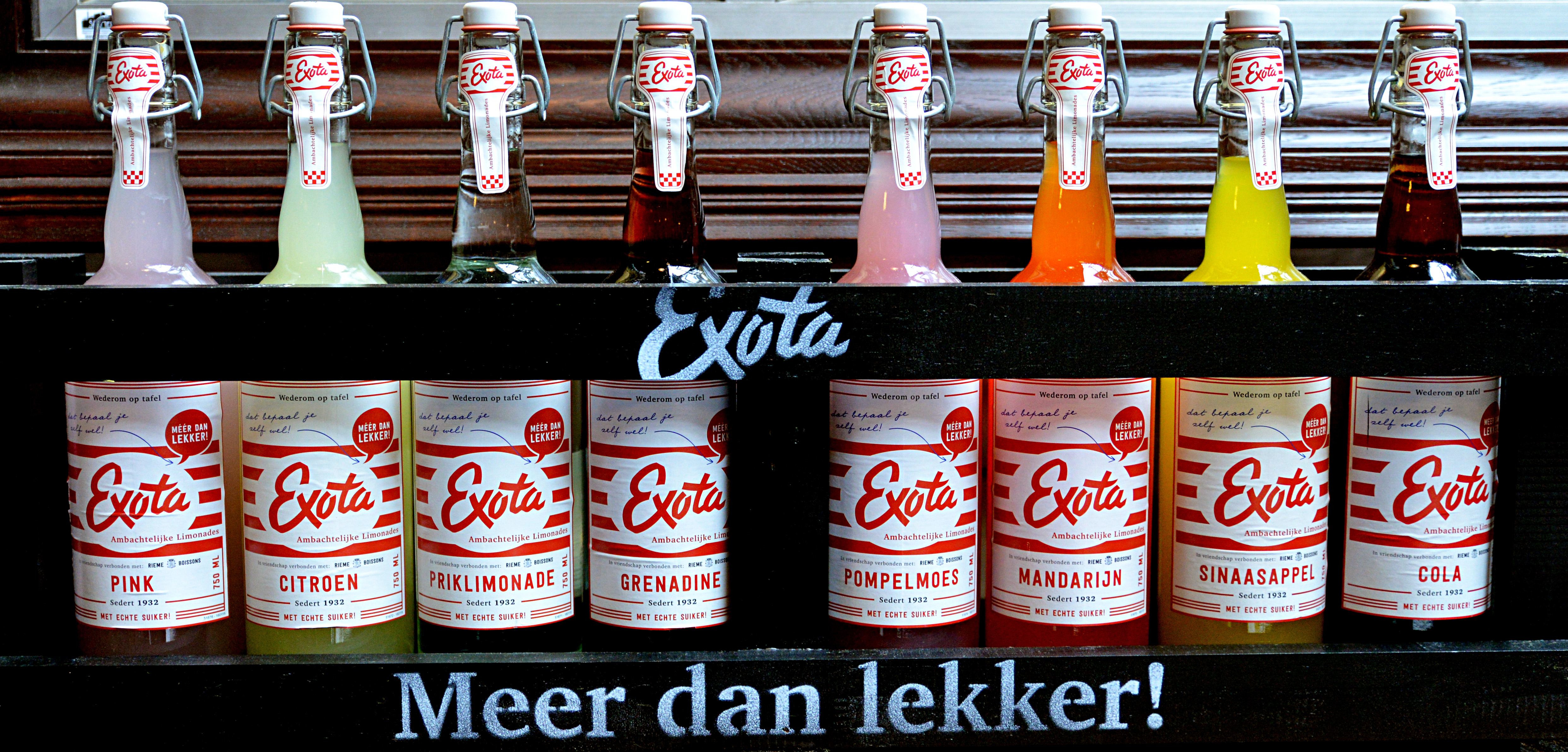 Acht verschillende smaken van Exota limonade. Flessen werden geëtaleerd bij Wittern op de Noordkade in Veghel.